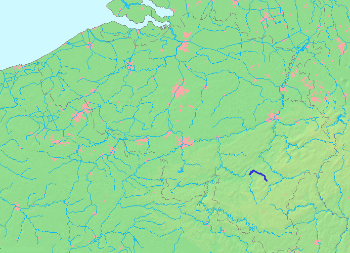 Kaart van de Lhomme op basis van Wikimedia Commons kaart MapBelgiumWater